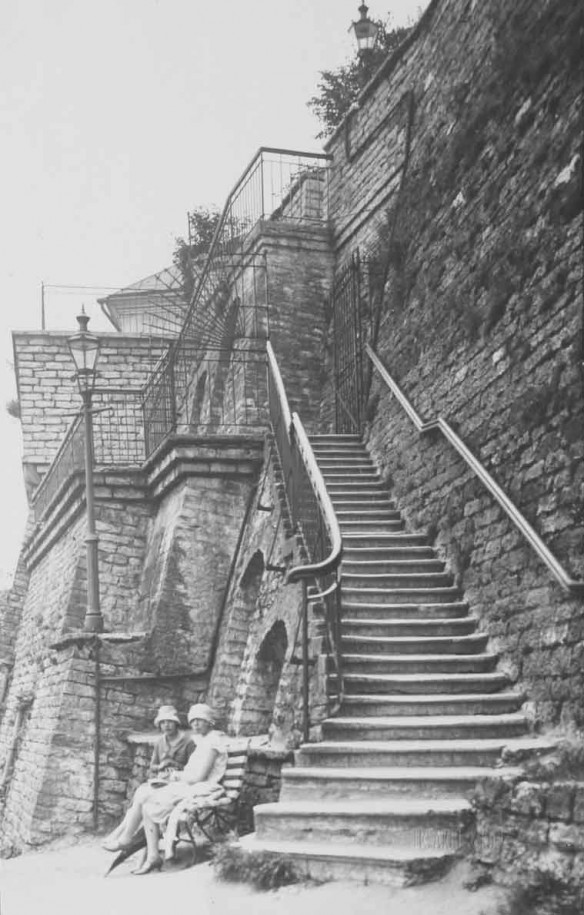 Patkuli trepp